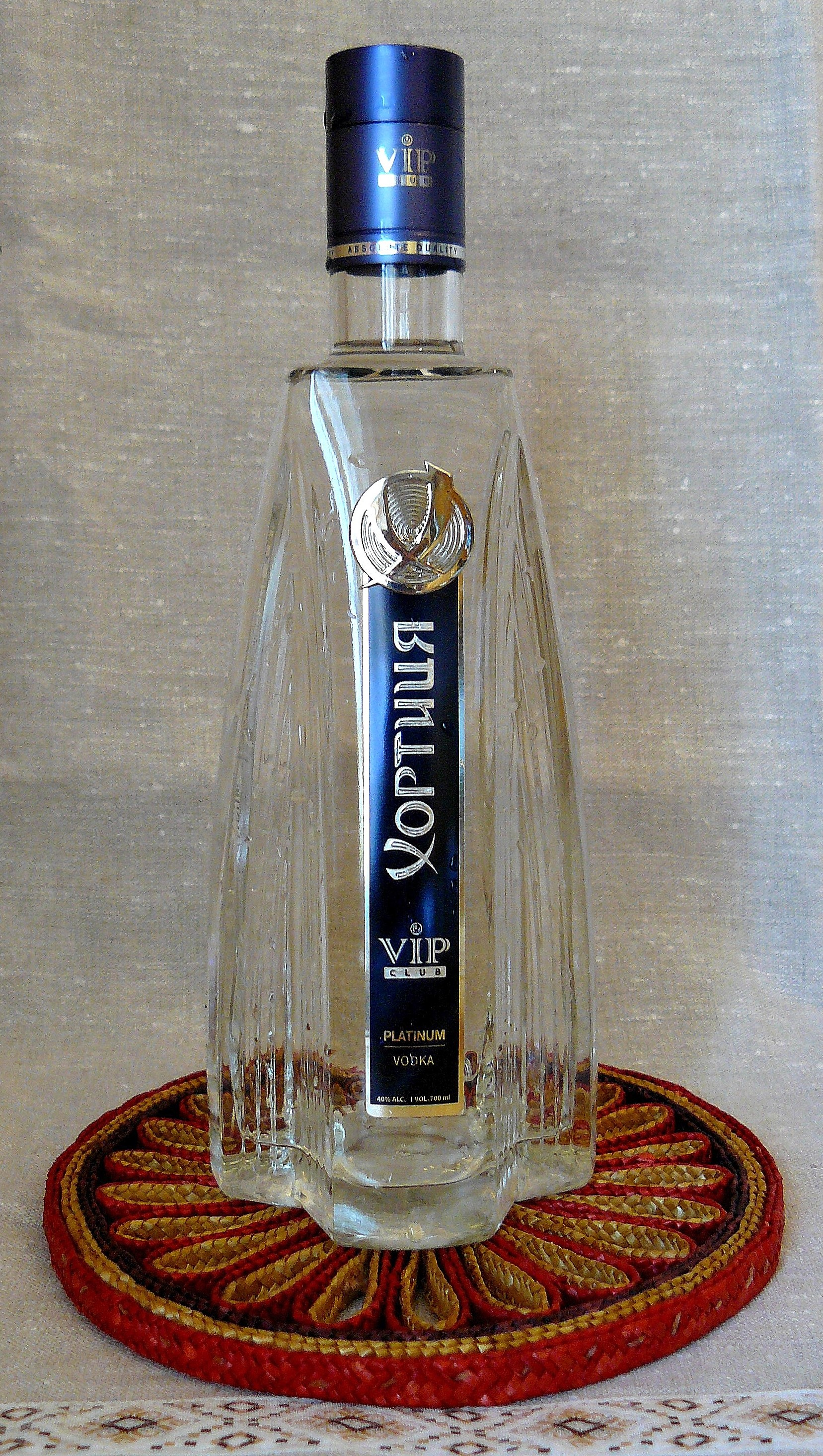 Vodka ukrainienne Khortytsa Platinum